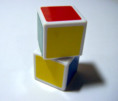 轉動中的1x1x2魔術方塊